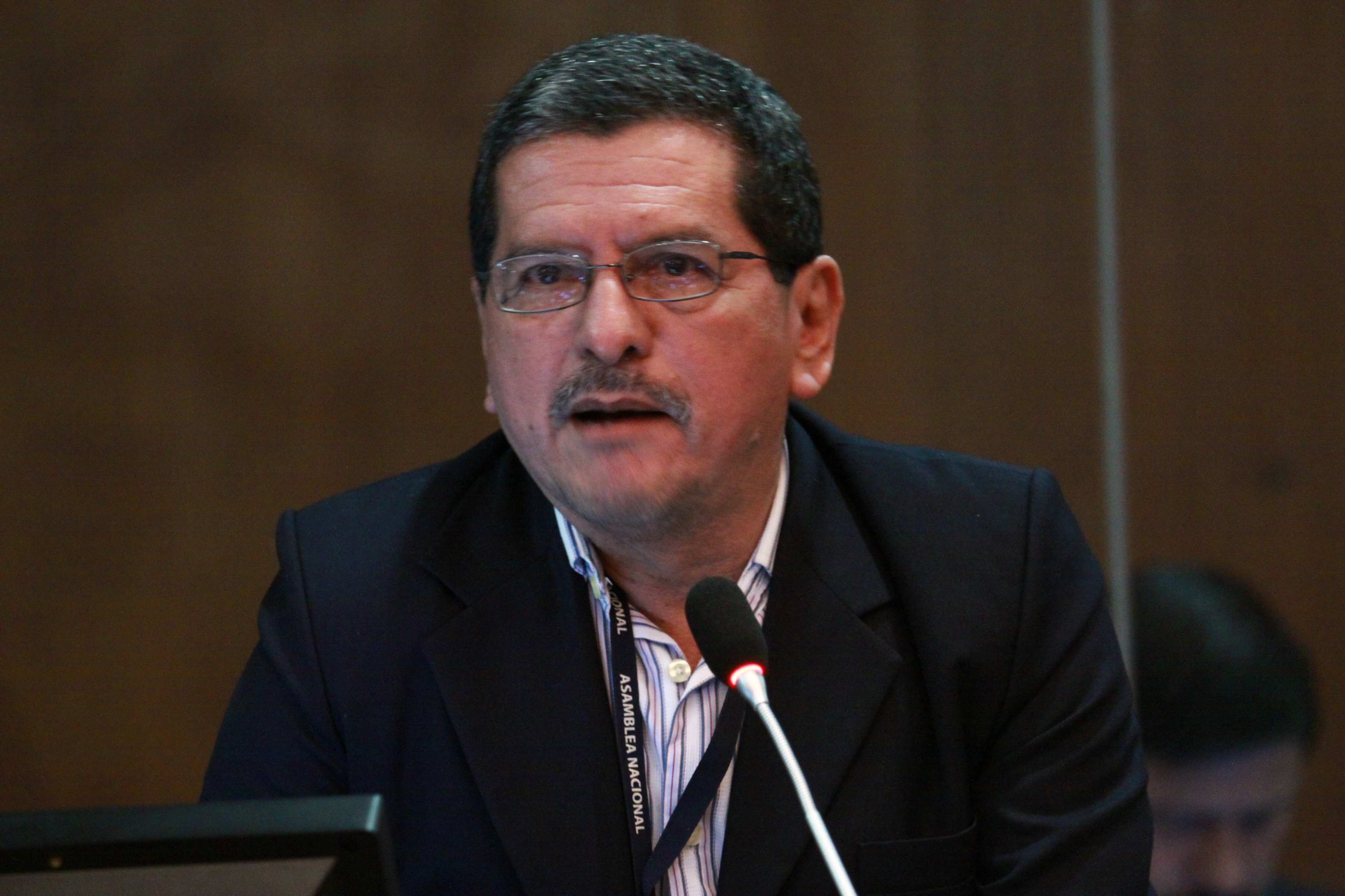 Foto: Hugo Ortiz Ron / Asamblea Nacional